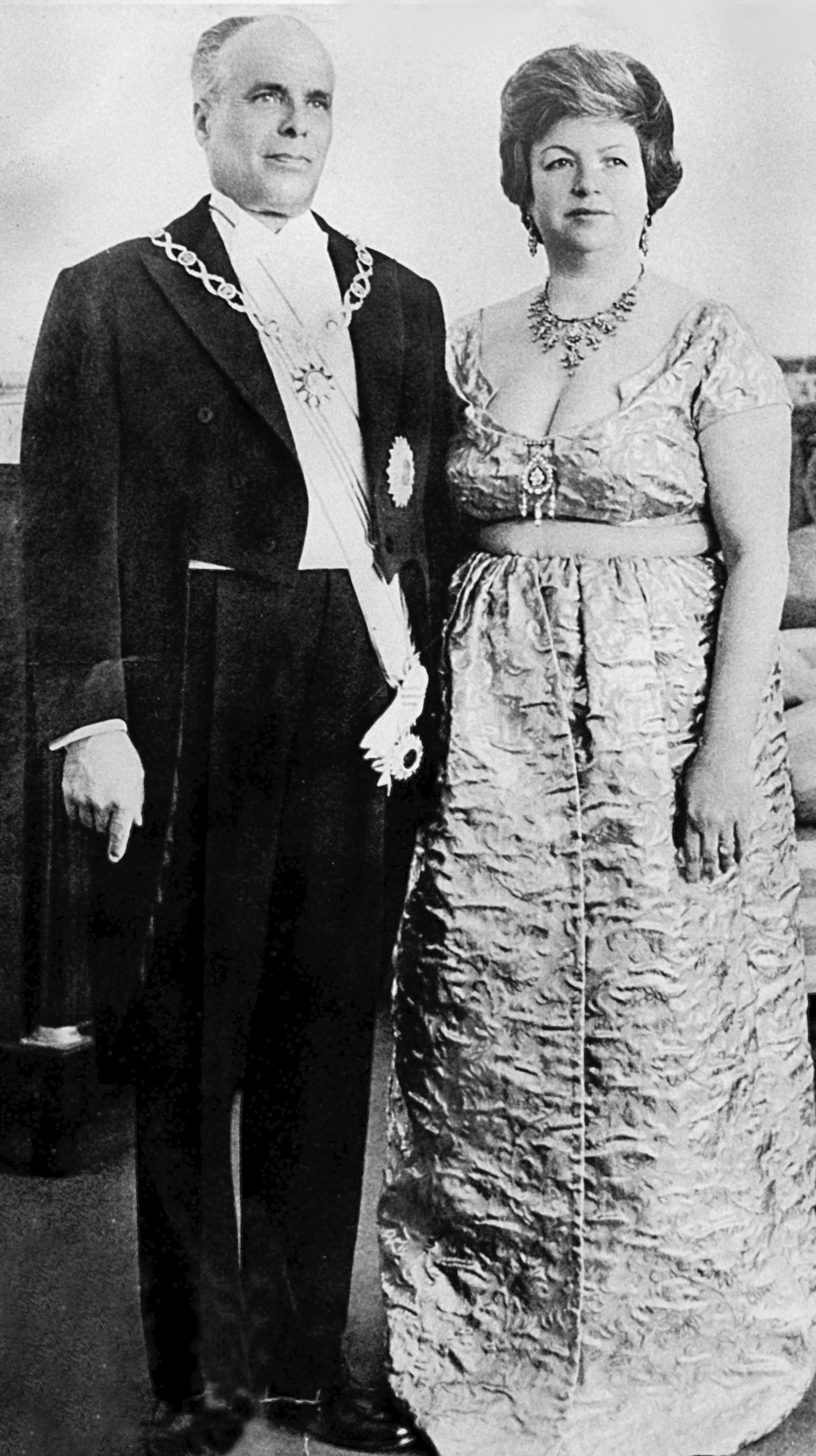 Photo de Habib Bourguiba et son épouse Wassila Bourguiba exposée au Musée de Bourgiuba à Monastir